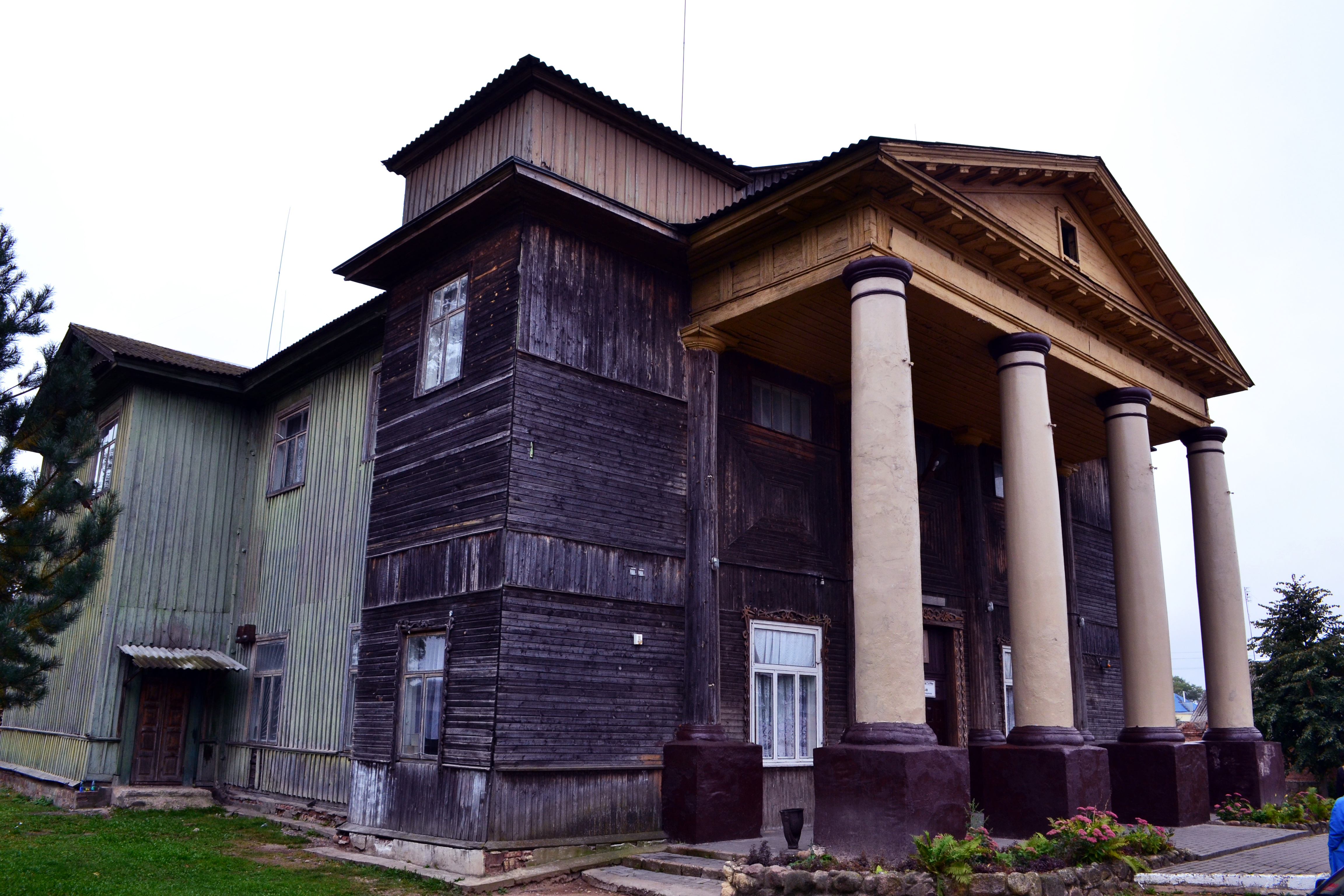 Беларуская (тарашкевіца): Былы касьцёл Сьвятога Крыжа (Узда) This is a photo of Belarusian heritage monument. Reference number: невядомы ( WLM)